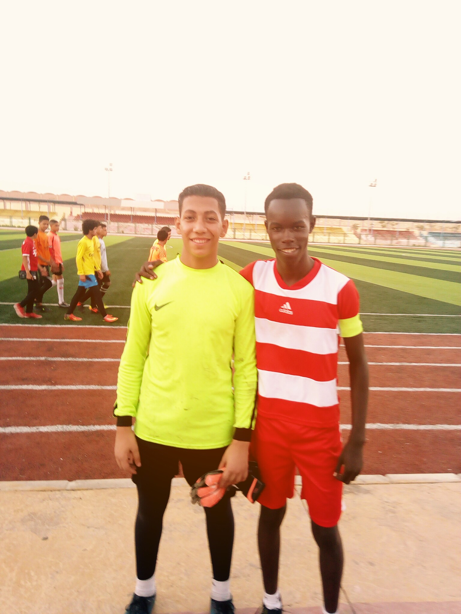 كابتن محمد وثابت